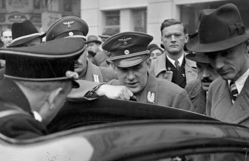 Scherl: Gauleiter [Odilio] Globocnik besichtigt die "Am Hof" vor der Gauleitung aufgestellten KdF-Wagen. Aufnahme Foto Blahn, Wien 29.11.1938 [Herausgabedatum]